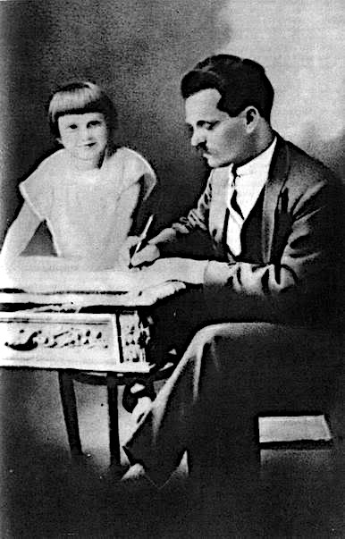 Нестор Махно с дочерью, Париж